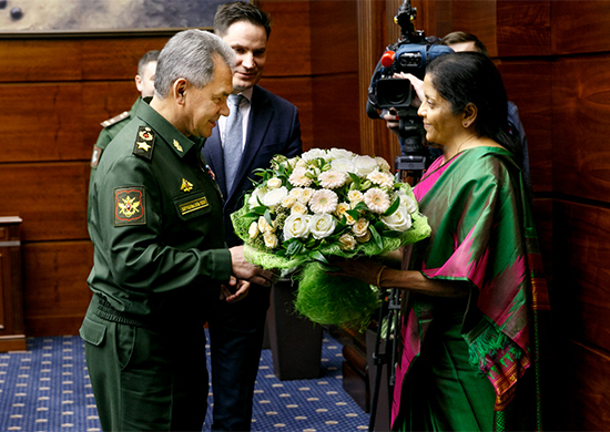 Встреча Министра обороны России Сергея Шойгу с Министром обороны Индии Нирмалой Ситхараман